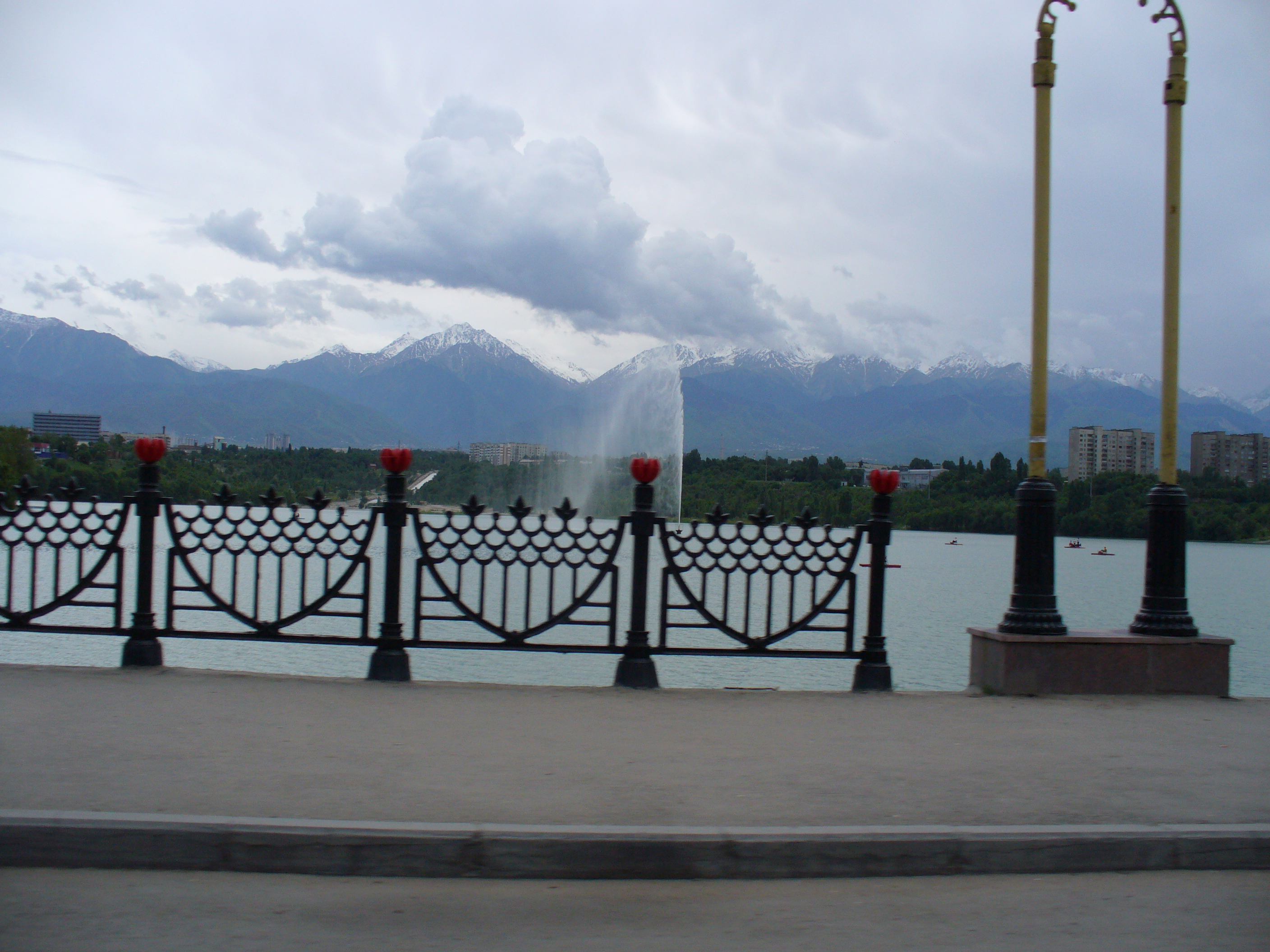 Вид на озеро Сайран с работавшим фонтаном.